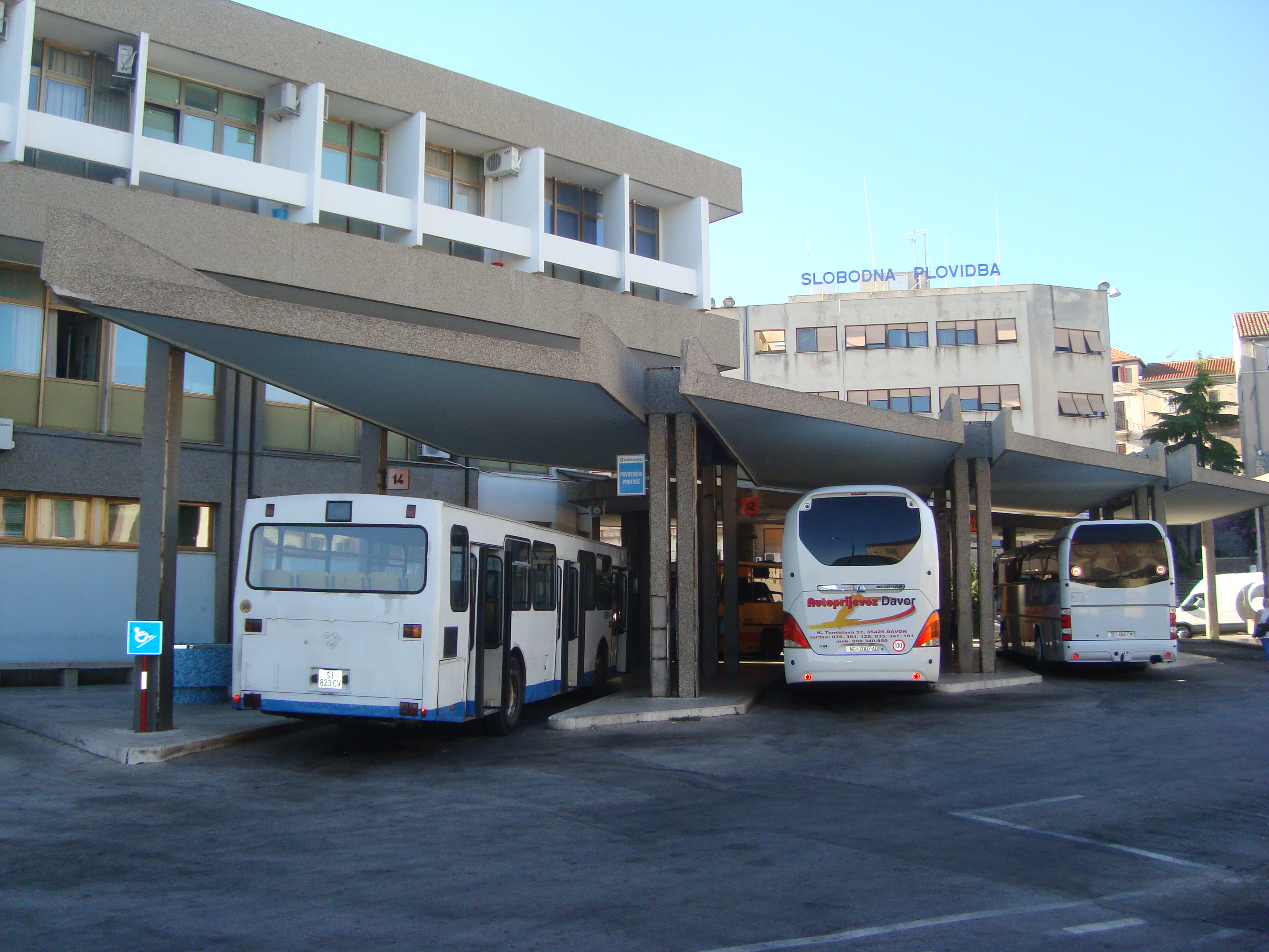 Autobusni kolodvor u Šibeniku